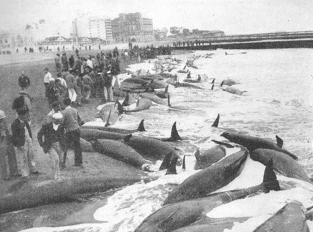 Pseudorcas o falsa orca ( pseudorca crasidens ) varadas en Mar del Plata, en Playa Bristol, Provincia de Buenos Aires, Argentina, un 10 de octubre de 1946